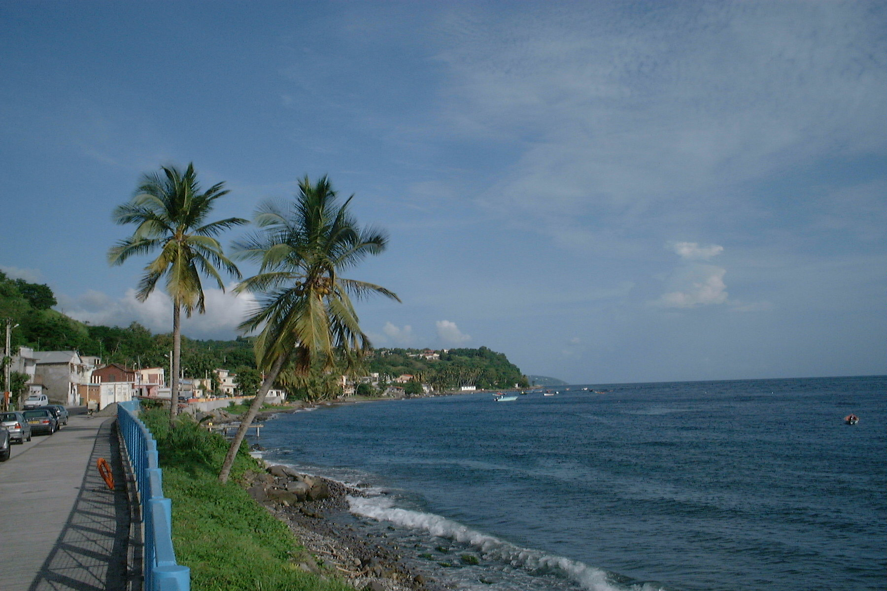 Anse Couleuvre, beach in Le Prêcheur, Martinique.